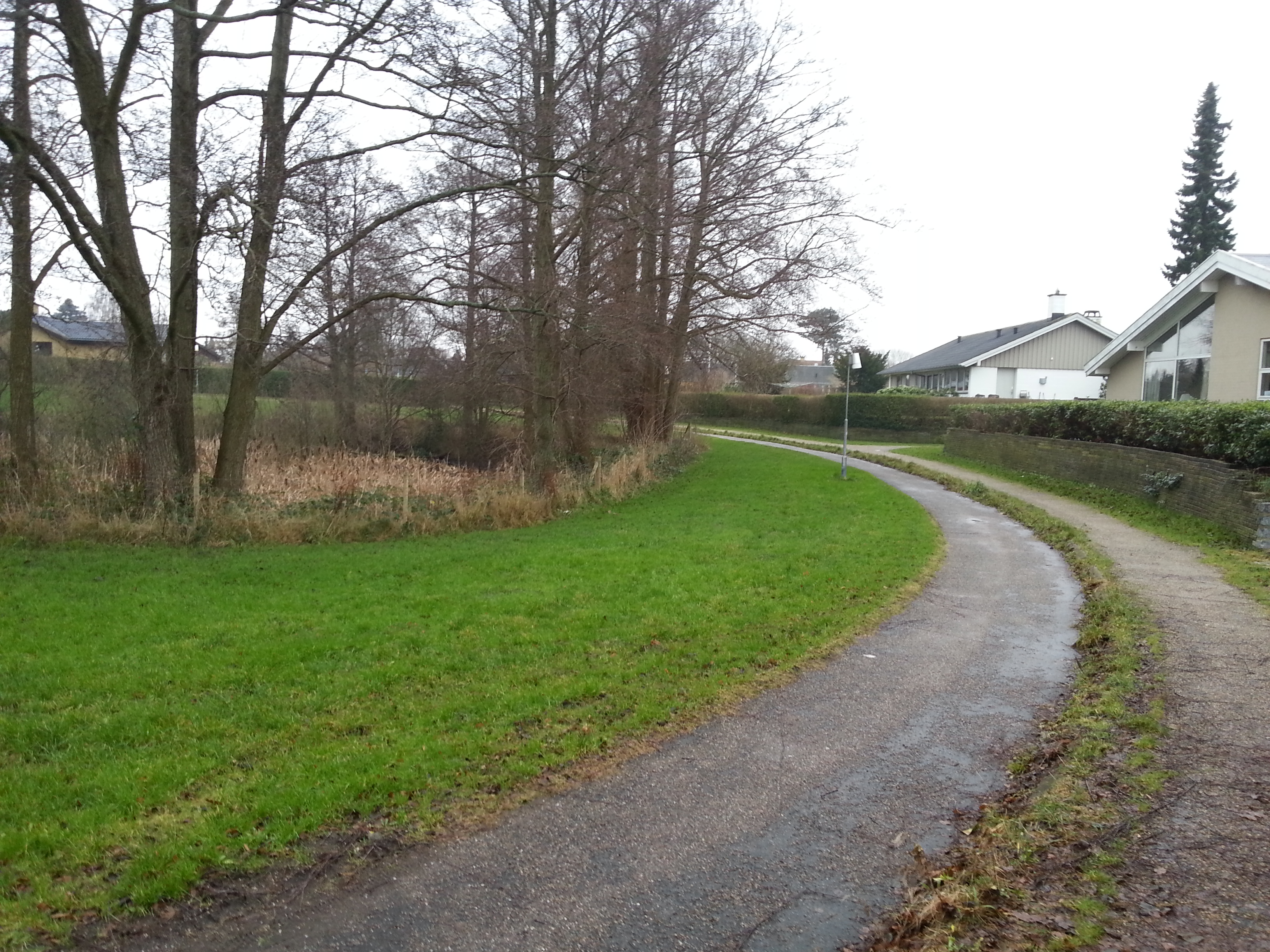 Separeret stisystem i boligområde i det sydøstlige Espergærde